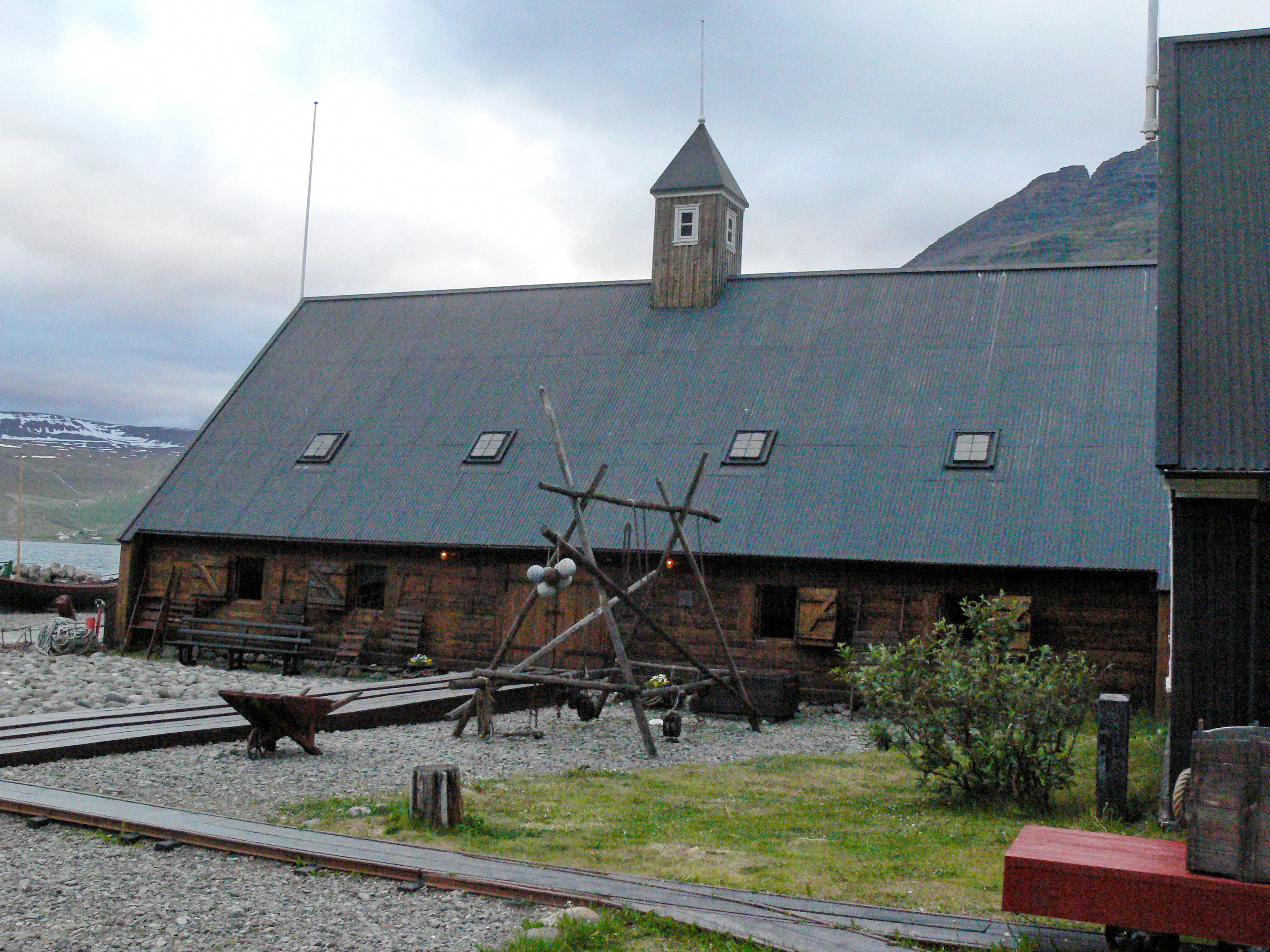 Fischereimuseum Turnhusið in Ísafjörður.